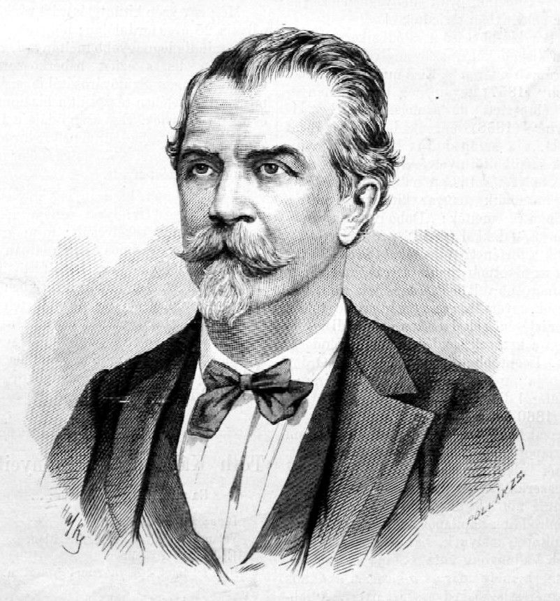 Tóth Kálmán (1831–1881) költő, drámaíró, politikus portréja. Pollák Zsigmond metszete